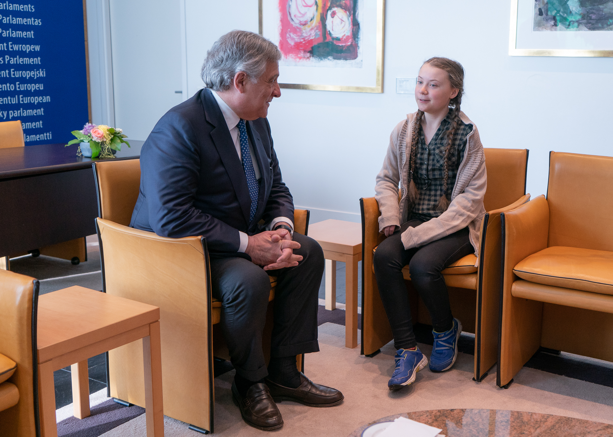 2019 france strasbourg EP EU political leader plenary session european union euroopaparlament europa parlamentet europas parlaments europe european citizens parliament europejski europeu parlamentul europos parlamentas europský europäisches parlament eurostudio európai ewropeweuropees parlaimintn aheorpa euroopan parlamente vropski parlamentil parlamento europeo parlamentti parlamentet parlement européen Parlaimint na hEorpa SONY ALPHA 9